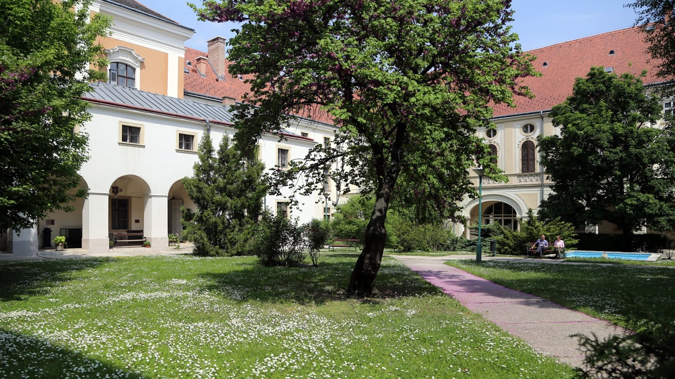 Telefónia Múzeum (Budapest)